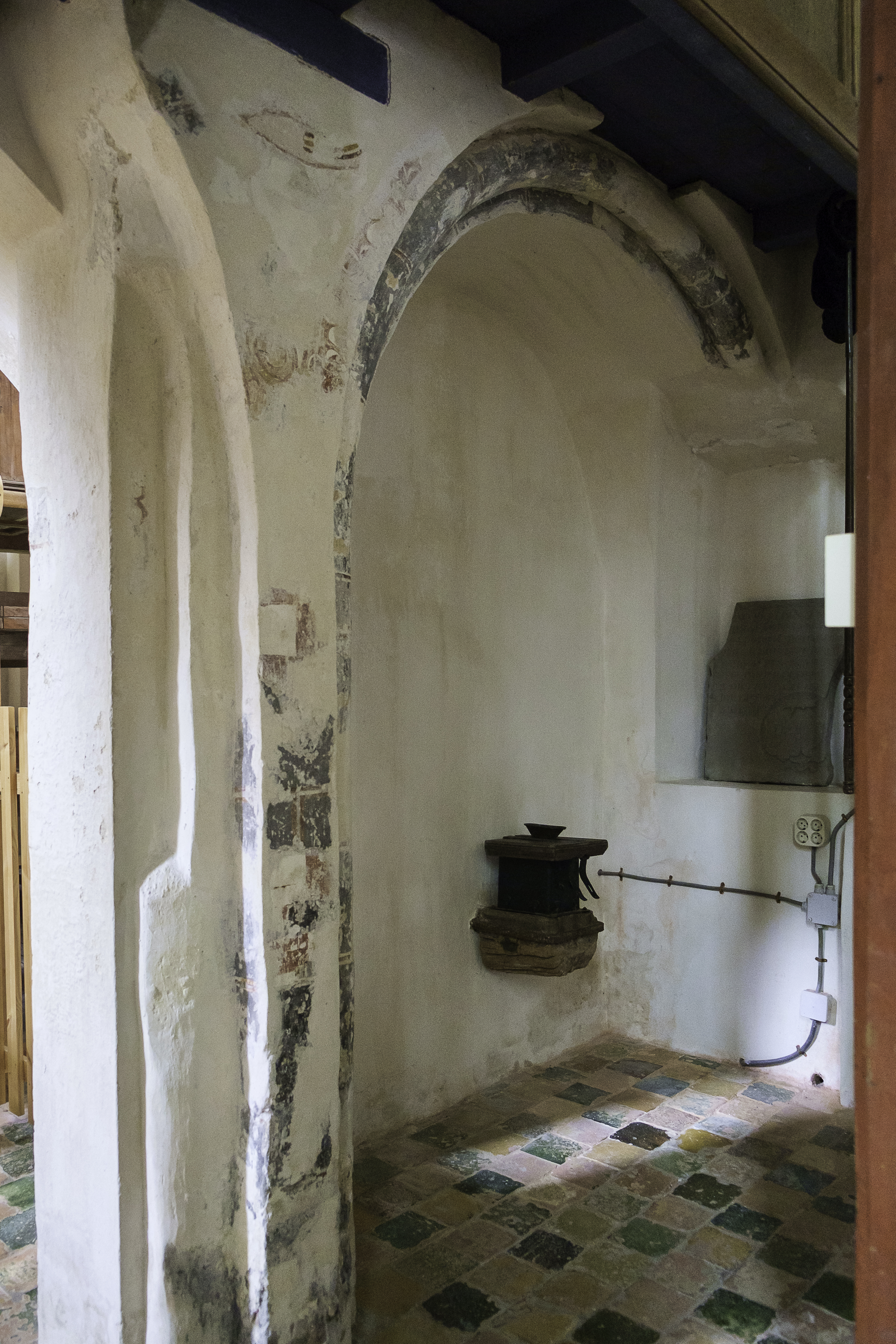 Doksaal in de Mariakerk in Krewerd